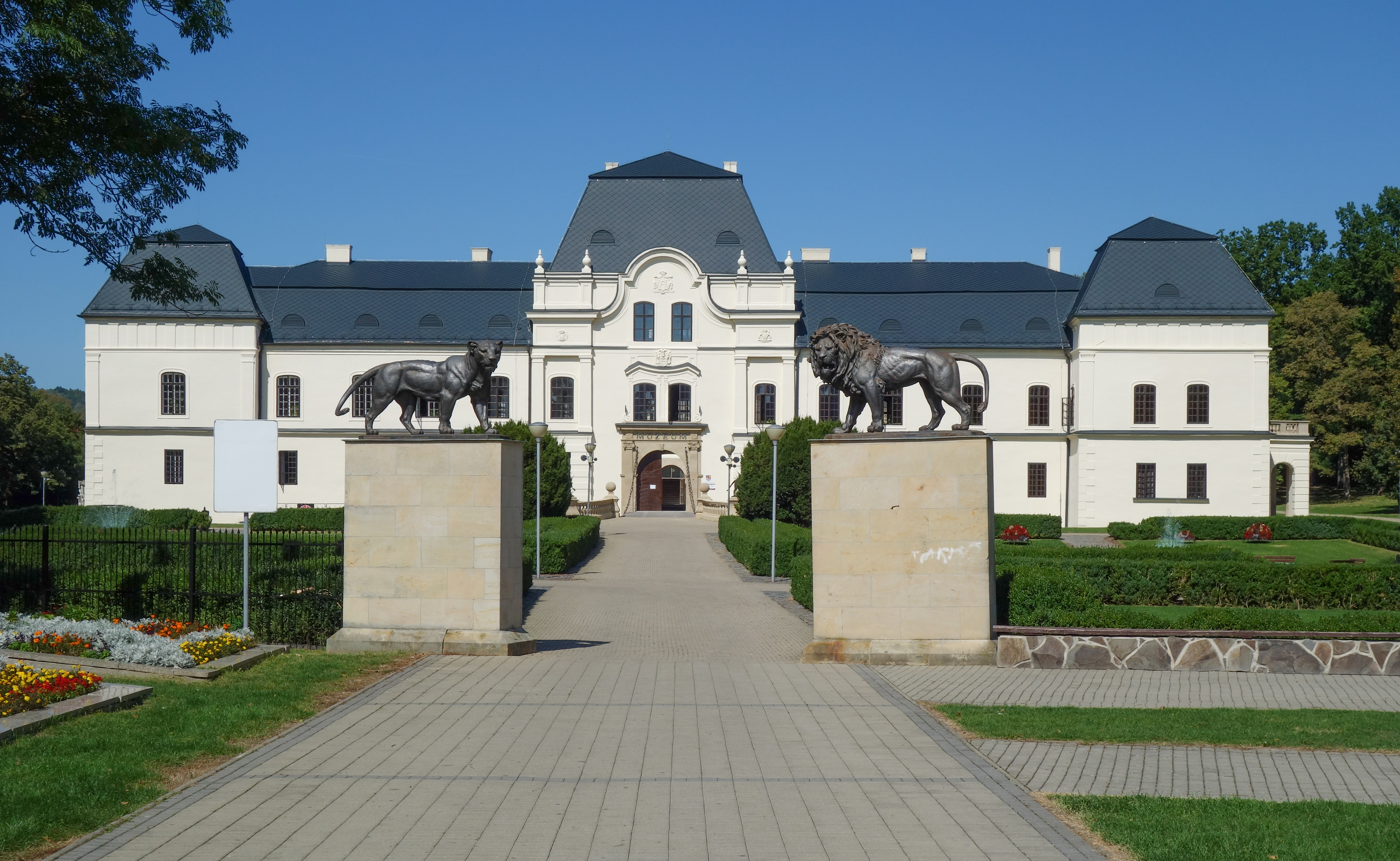 Humenský zámok (Kaštieľ v Humennom), v budove renesančného zámku sídli Vihorlatské múzeum